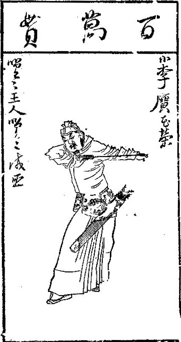 版画《水浒叶子》，水浒人物“花荣”